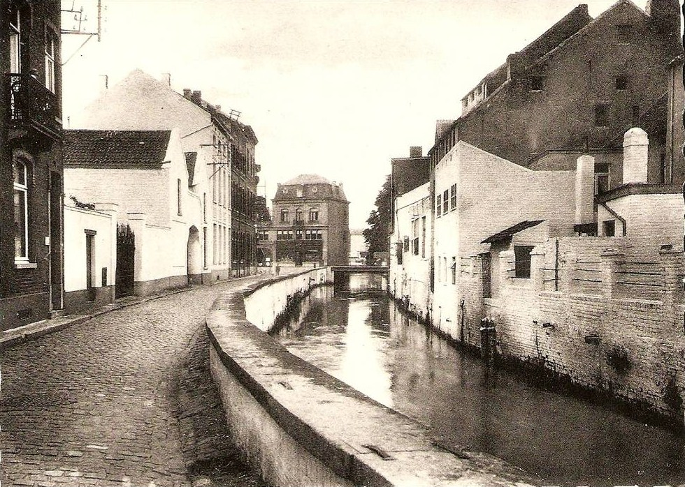 Le Pont du Christ, le quai aux huitres, la rivière Dyle dans la ville de Wavre (Province du Brabant Wallon) au début du 20ème siècle. Ancienne carte postale vers 1910